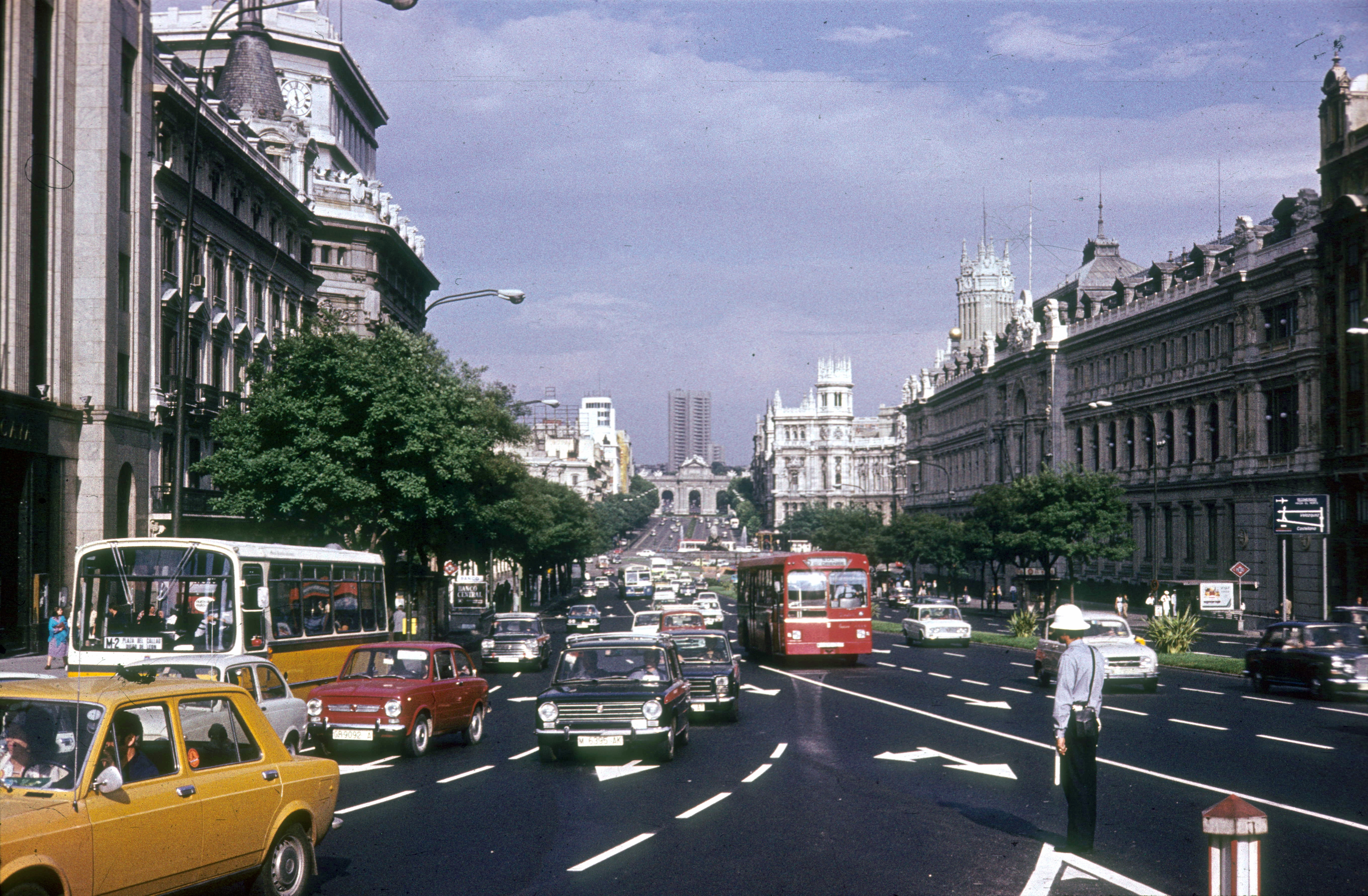 Calle de Alcalá a Gran Vía felől a Plaza de Cibeles felé nézve. Location: Spain Tags: colorful Title: Calle de Alcalá a Gran Vía felől a Plaza de Cibeles felé nézve.